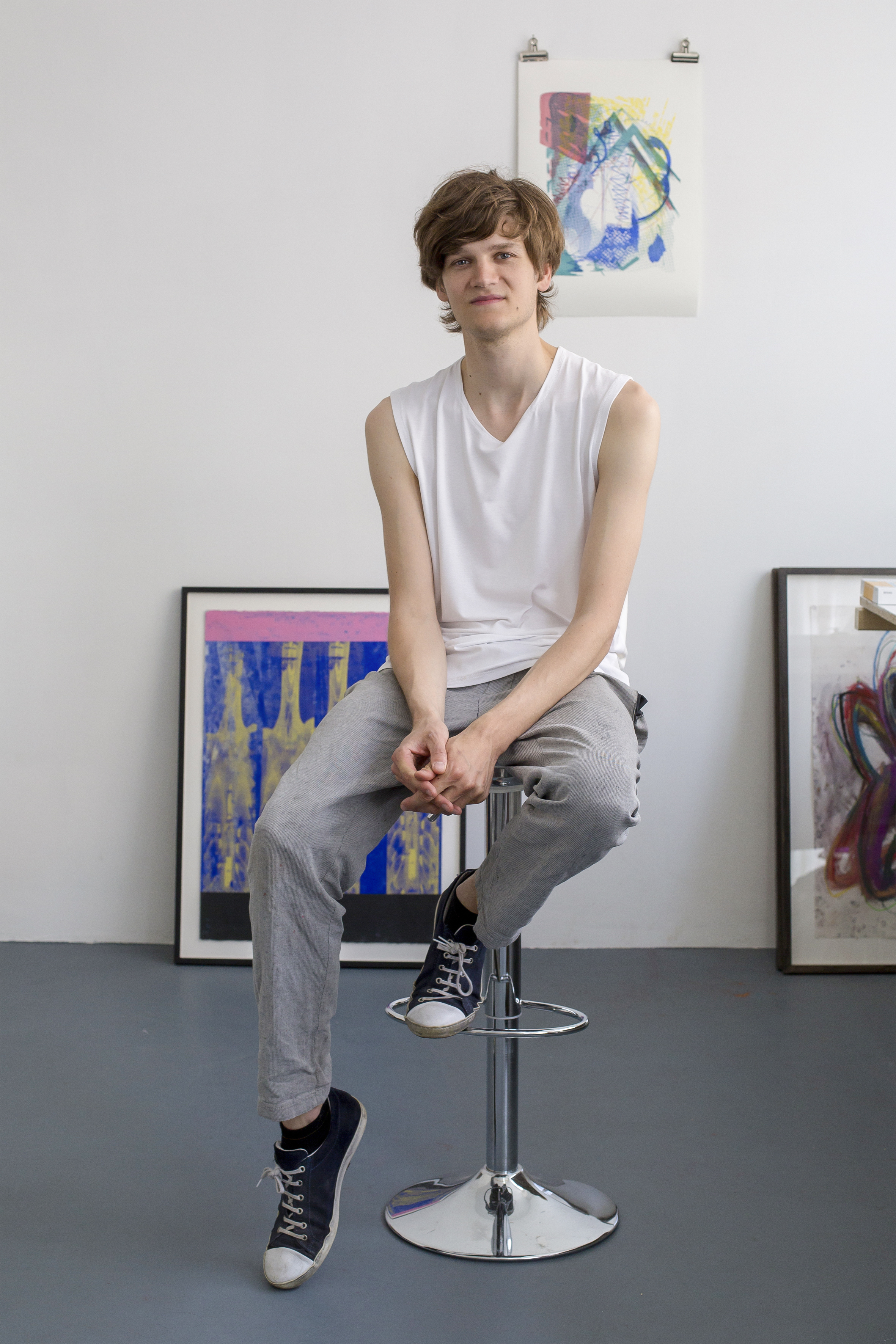 Malte Kebbel by Stefanie Walk